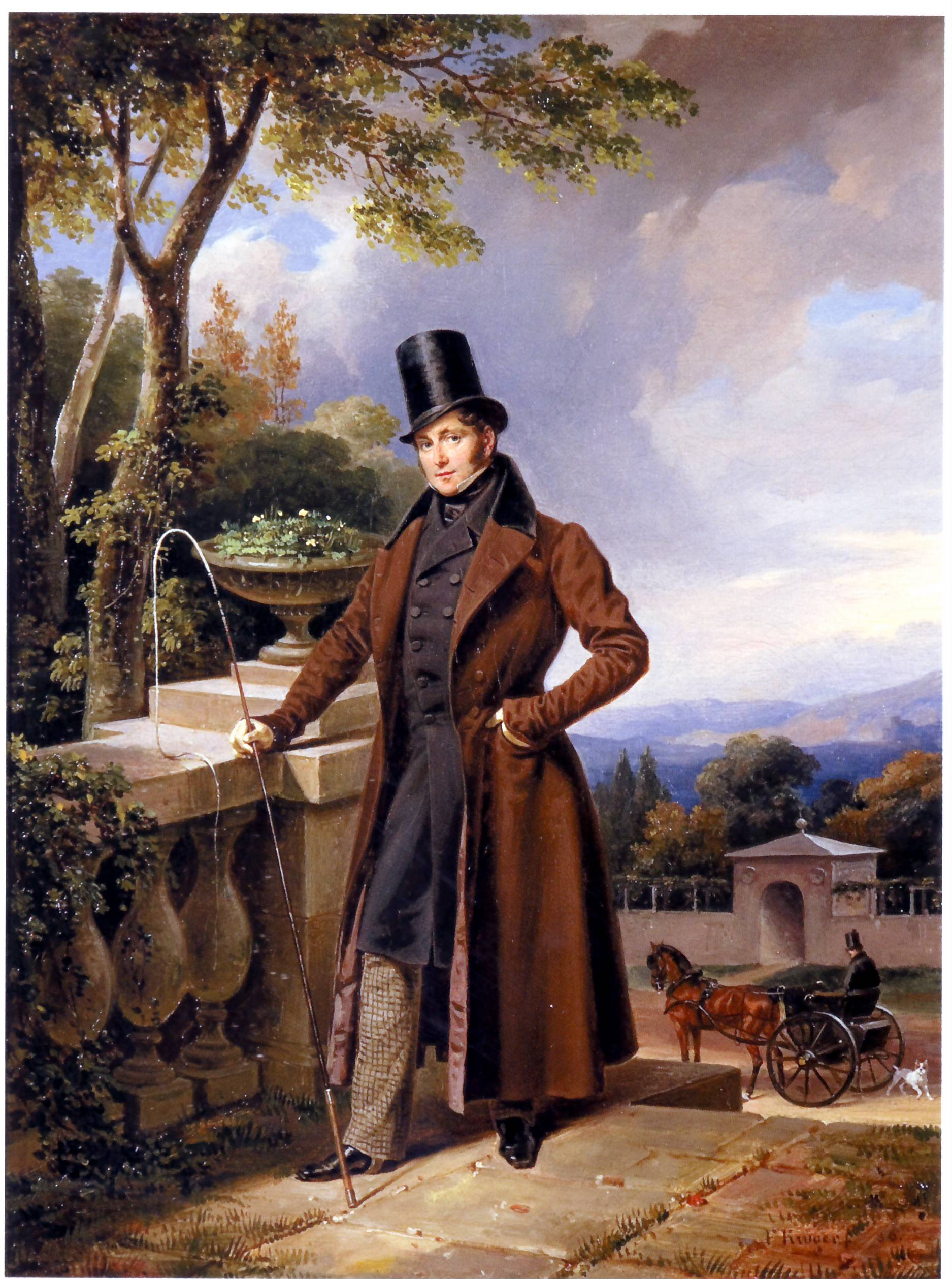 Лев Петрович Витгнштейн (1799-1866).